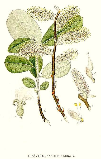 Original Description Gråvide, Salix cinerea L.